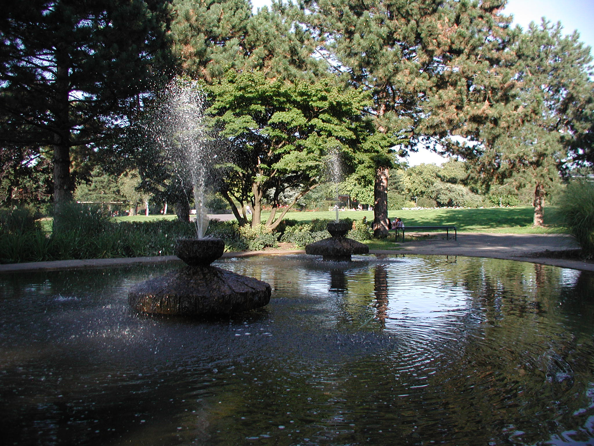 Köln Rheinpark, Brunnen im "Adenauerweiher".